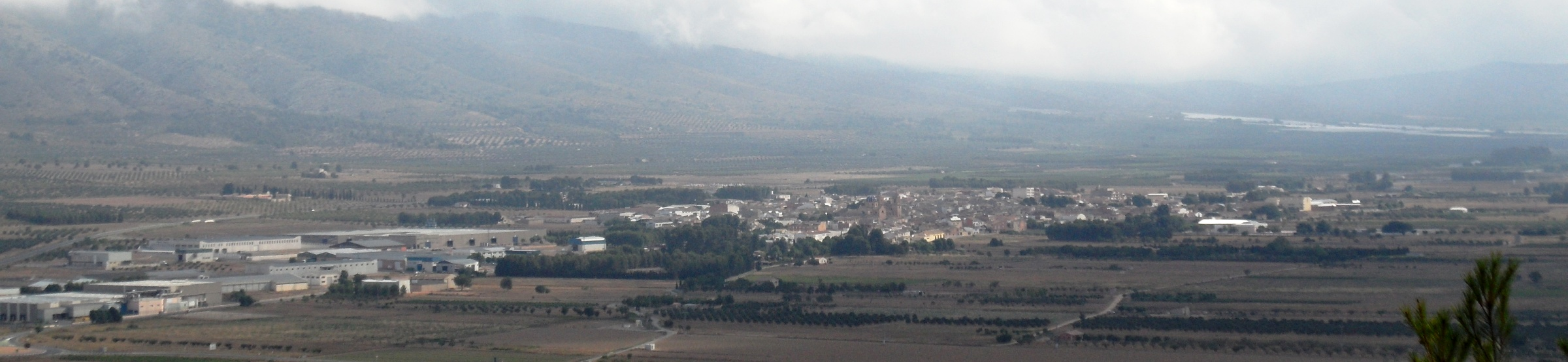 Beneixama des de l'ermita de Sant Bartomeu del Camp de Mirra.